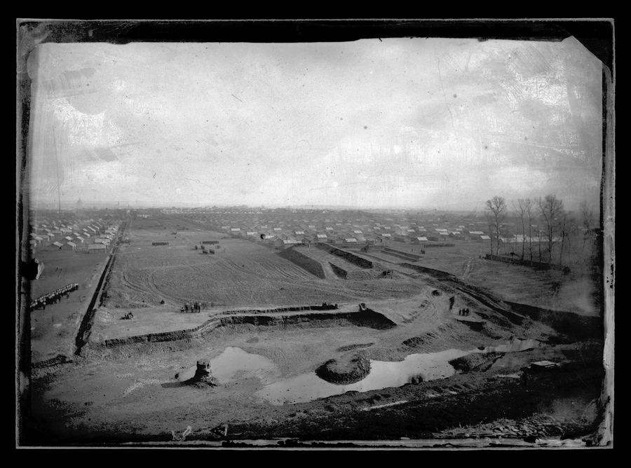 Camp militaire du Polygone, avenue de Grande-Bretagne. Février 1871. Vue panoramique du camp prise depuis les hauteurs de Purpan ; au premier plan terrain ; au second plan au centre militaire, à droite et à gauche baraquements ; au fond à gauche silhouette du dôme de La Grave.